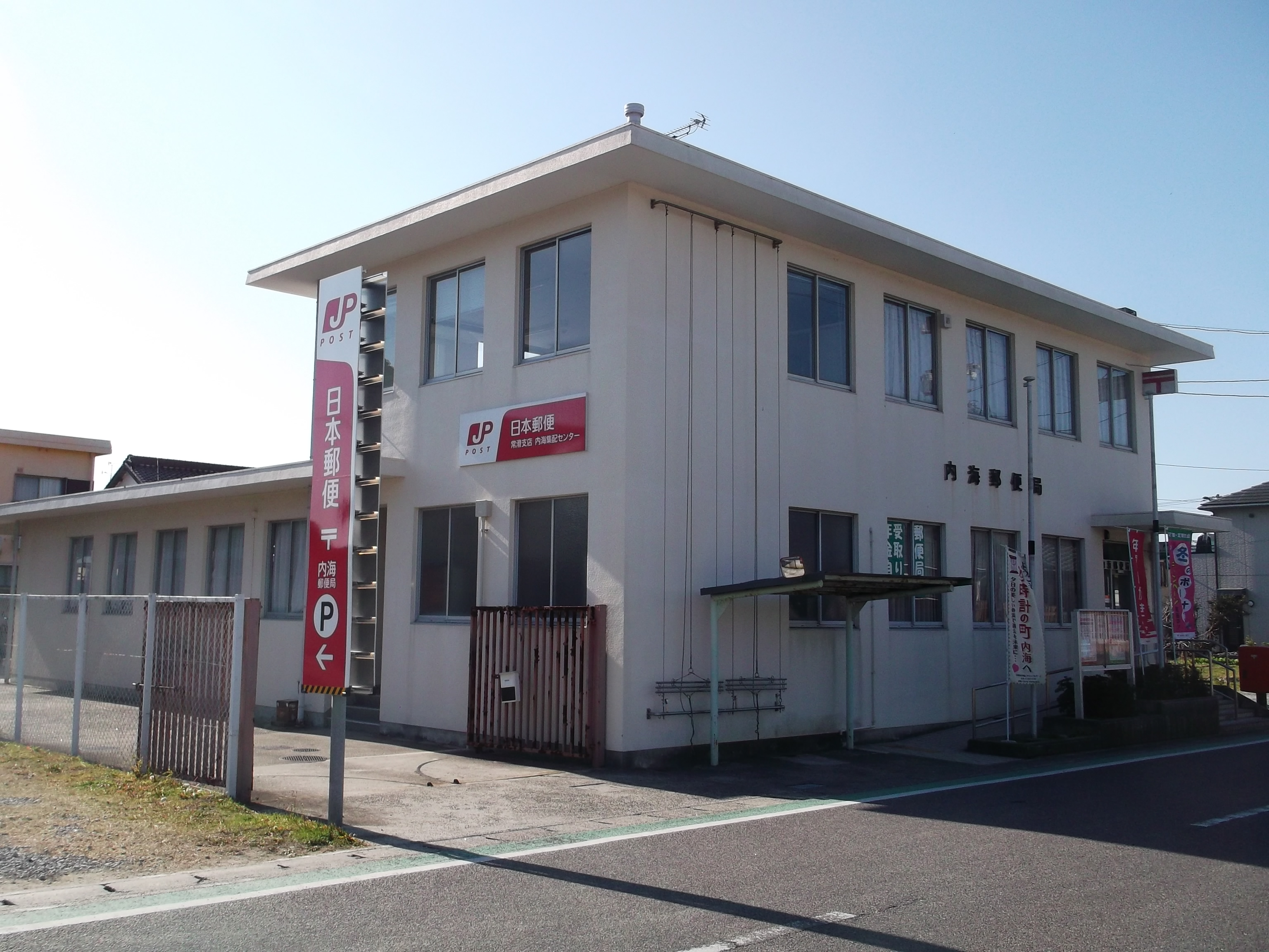 愛知県知多郡南知多町 内海郵便局